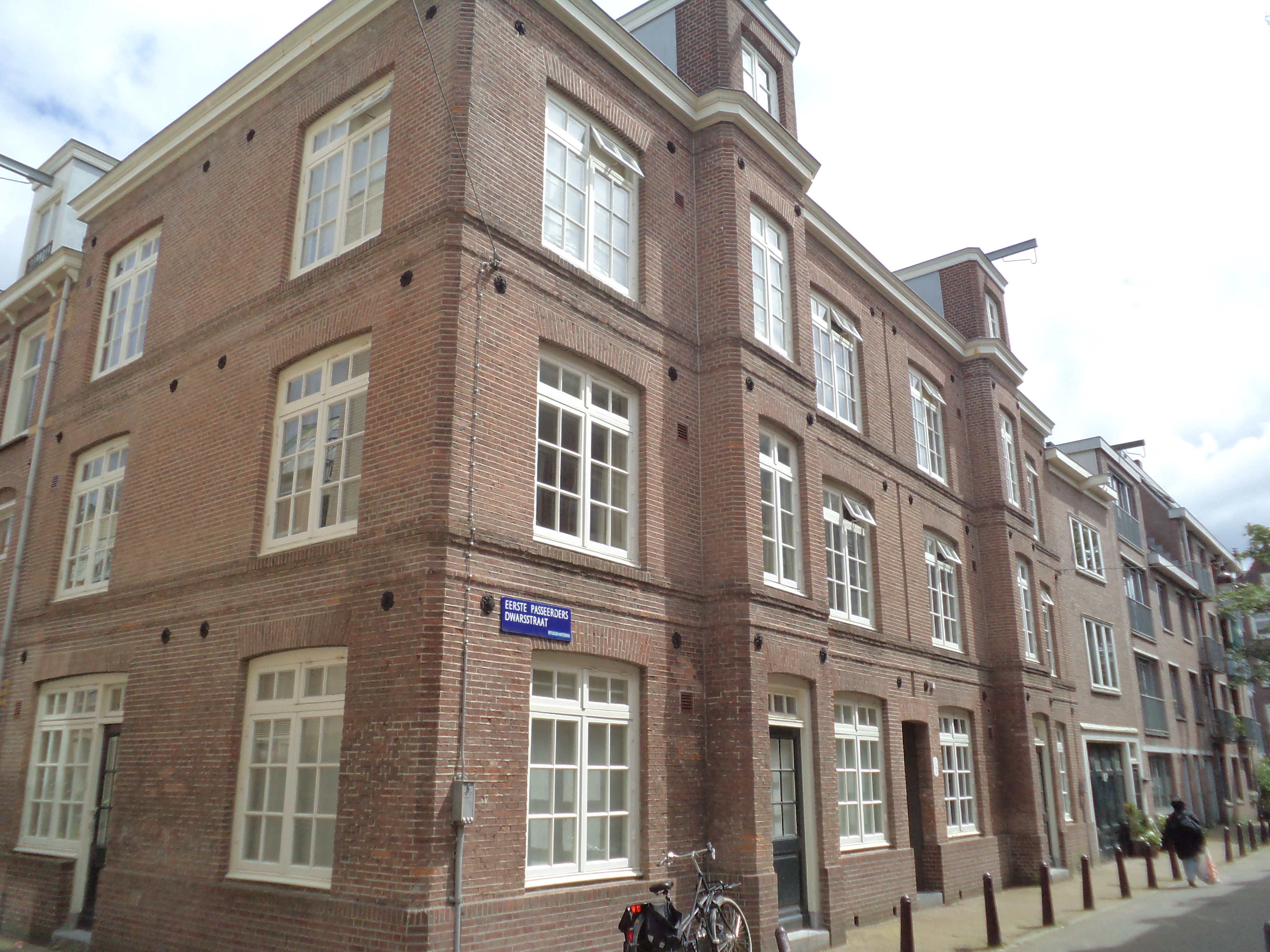 Klein modelblok arbeiderswoningen op de hoek Passeerdersstraat-Eerste Passeerdersdwarsstraat in de Amsterdamse volkswijk Jordaan, gebouwd 1852-1853 in opdracht van de Vereeniging ten behoeve der Arbeidersklasse te Amsterdam (VAK), H. Hana